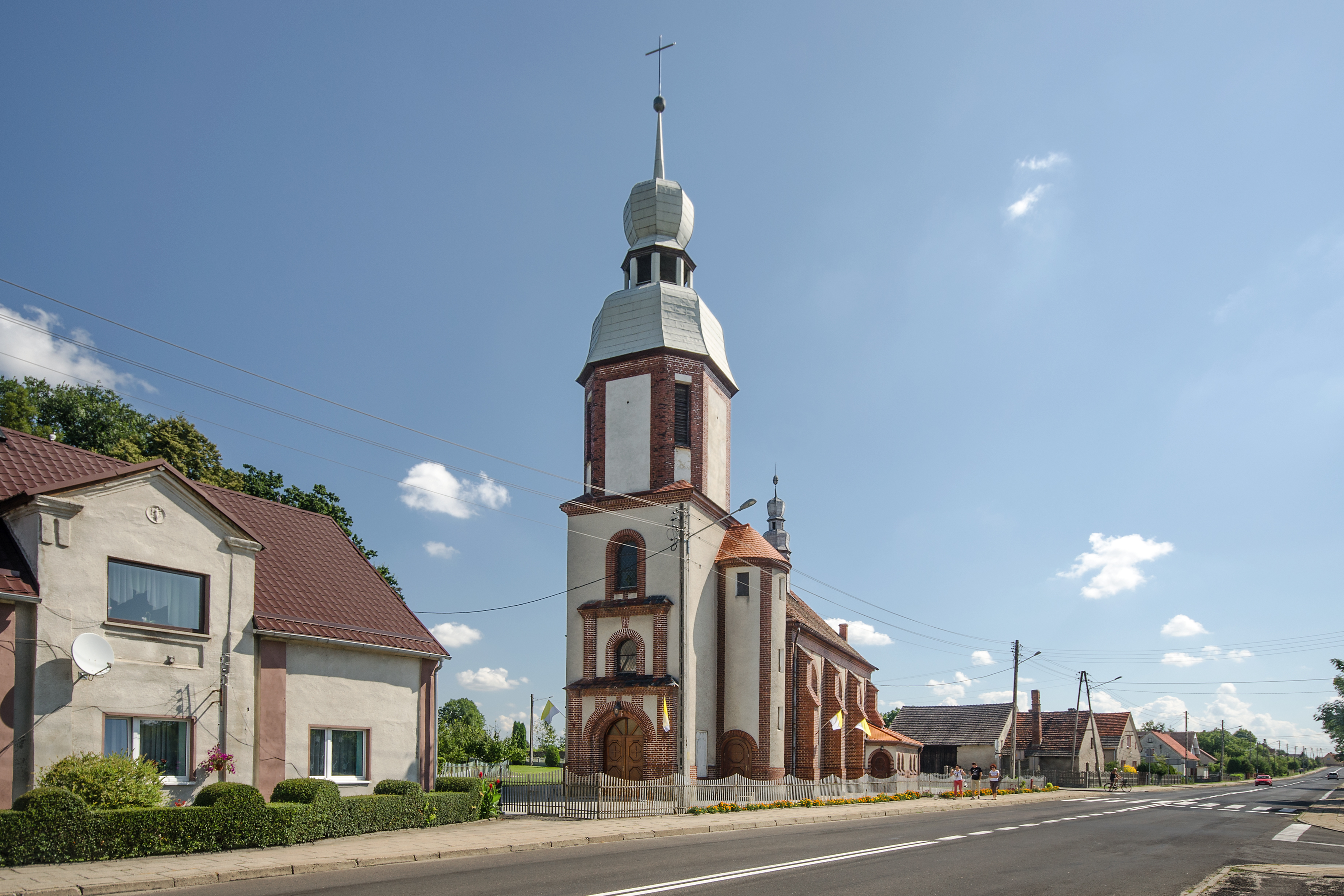 Kościół św. Katarzyny, Skarbiszów, pow. opolski, woj. opolskie